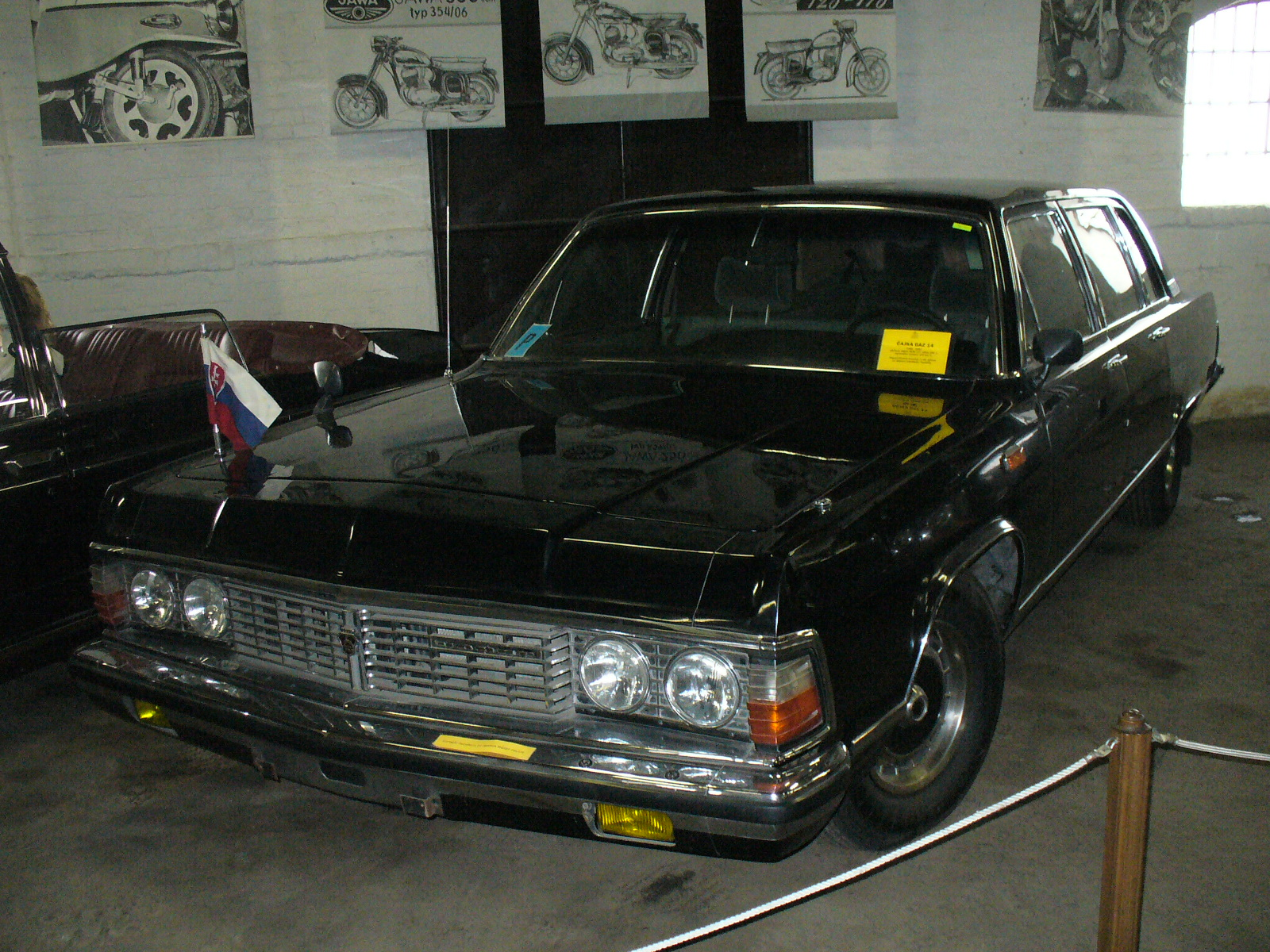 GAZ-14 Czajka (Чайка). Muzeum Dopravy Bratislava